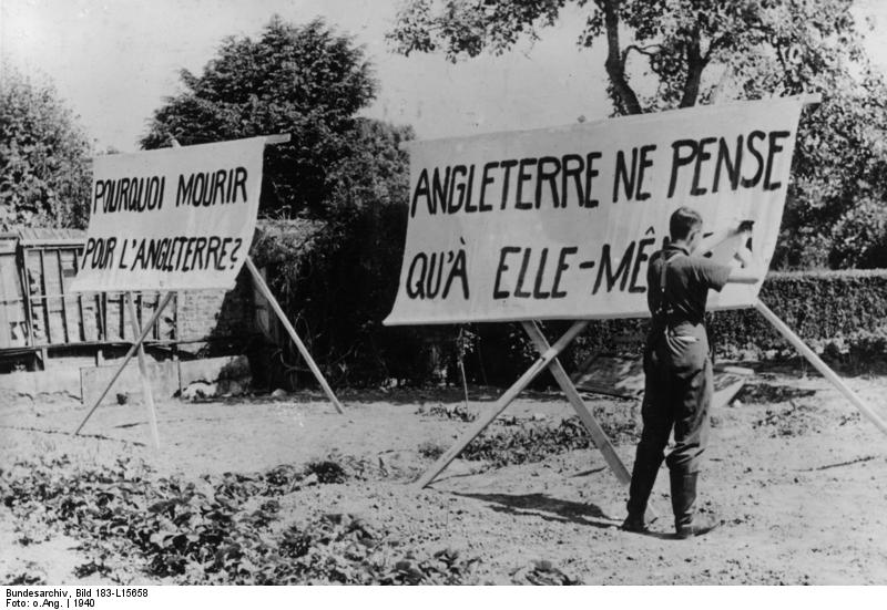 Im Westen, Propaganda-Transparente Scherl: Auch die Feindpropagande gehörte zur Aufgabe der Propaganda-Kompanie Im Westen 6.12.40 [Im Westen.- Deutscher Soldat einer Propagandakompanie beim Anfertigen von Propaganda-Transparenten in französischer Sprache ("Aktivpropaganda")]